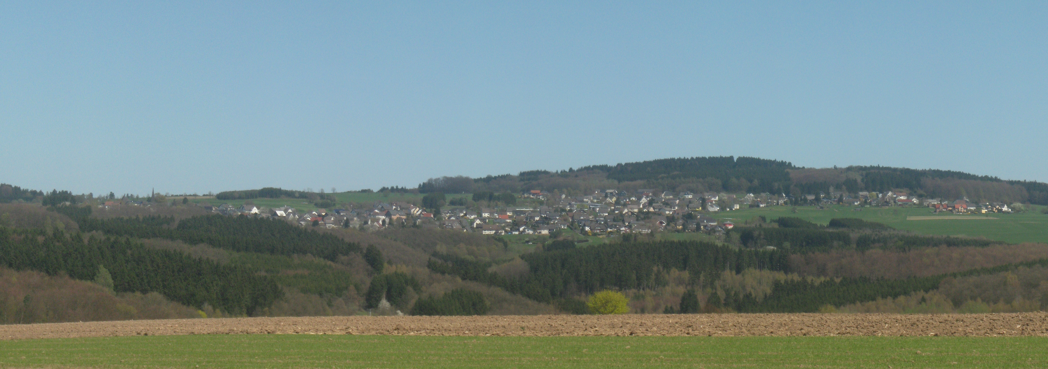 Ortsansicht von Malberg (Hommelsberg & Steineberg), Westerwald